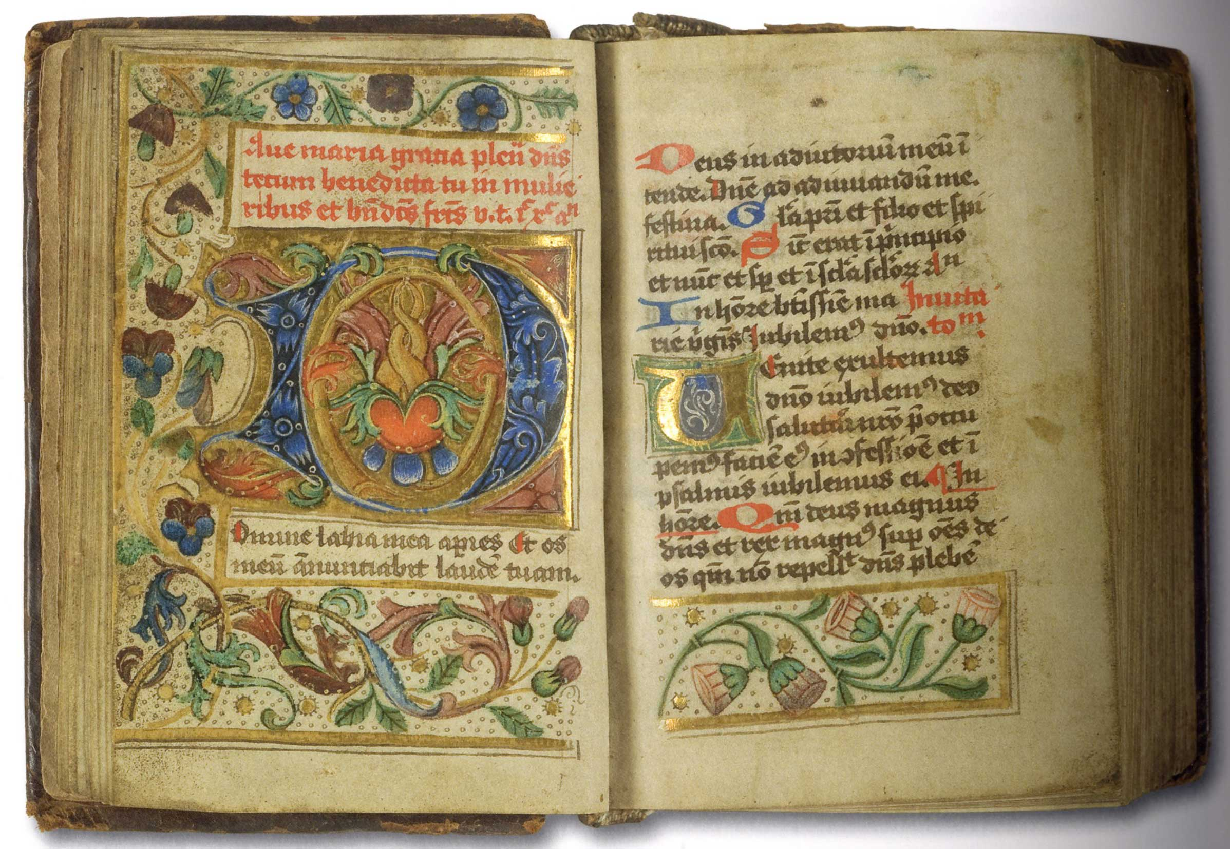 Breviarium geschreven in het Benedictinessenklooster Thesinge